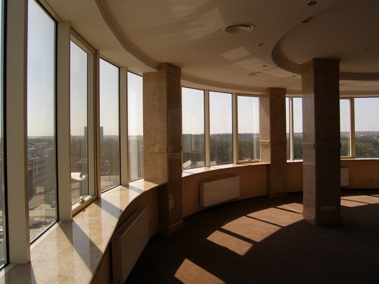 Бізнес_центр_Golden_Center_в_середині